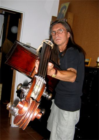 Bogdan Mizerski (b. 1955), Polish musician